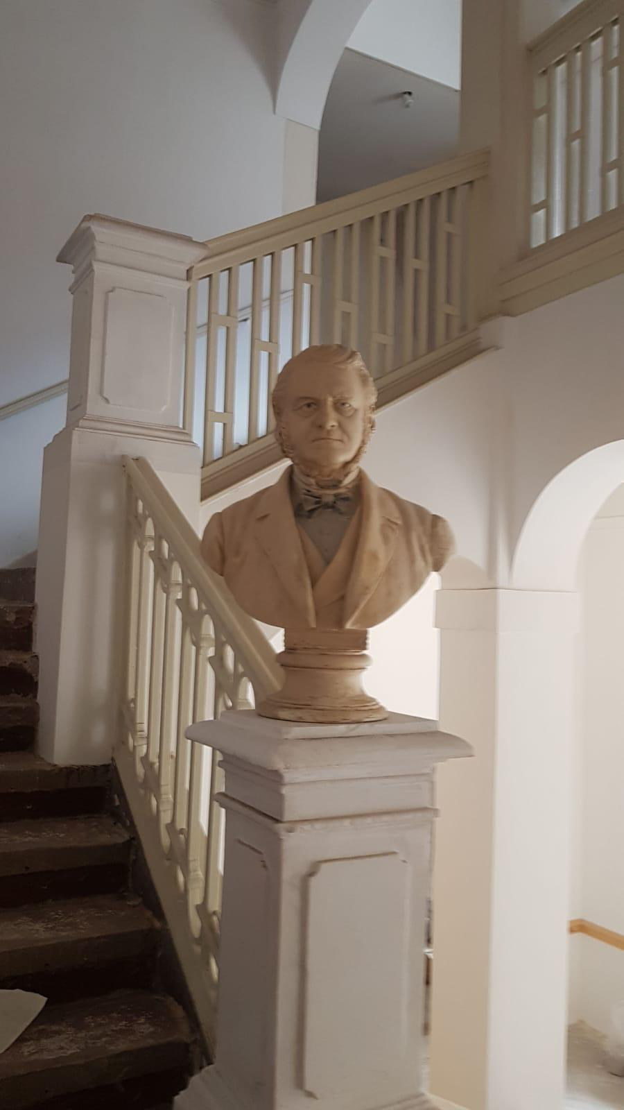 Statue, geschaffen von Felix Görling